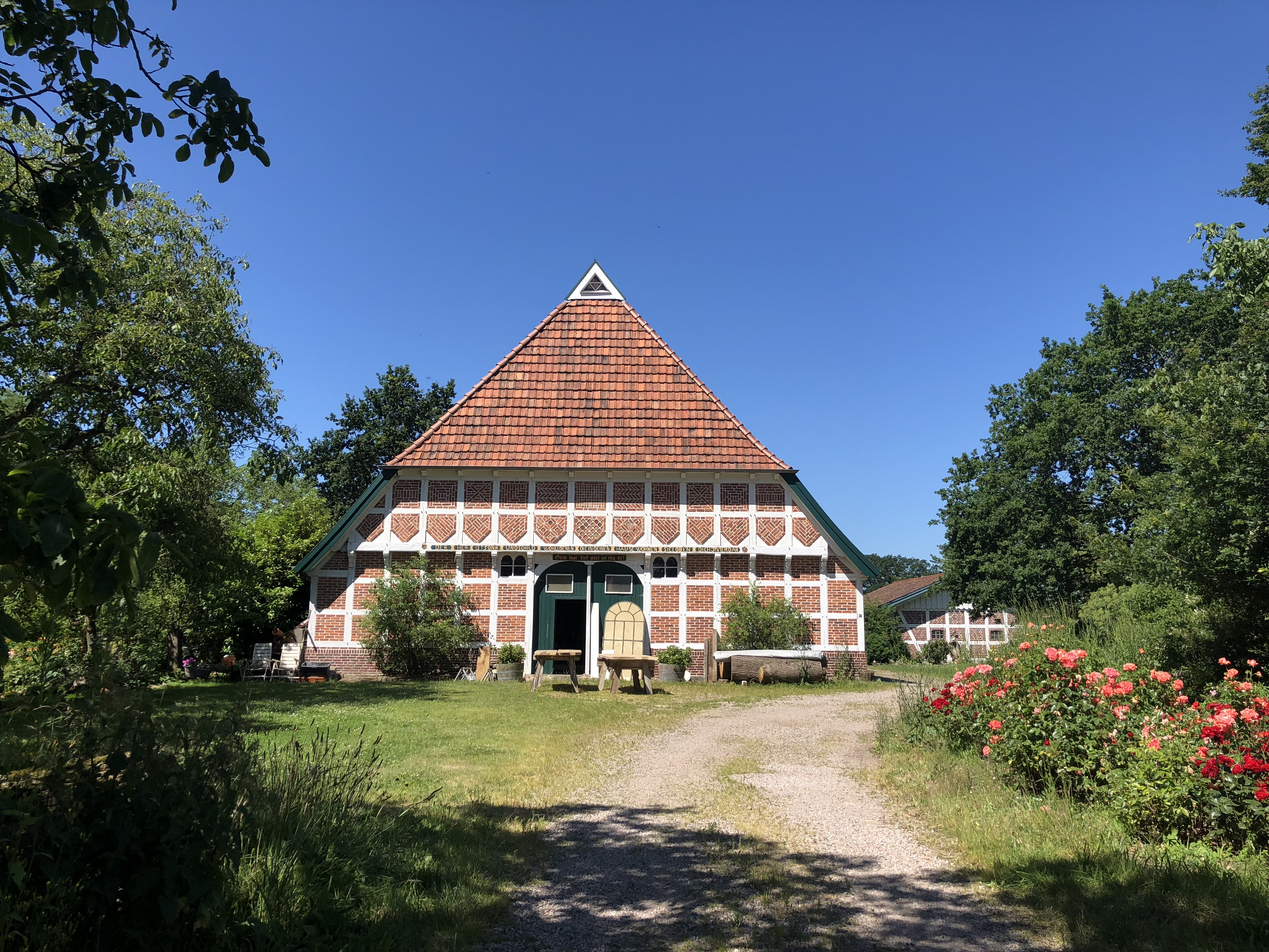 Buurnhuus in Griemshorst